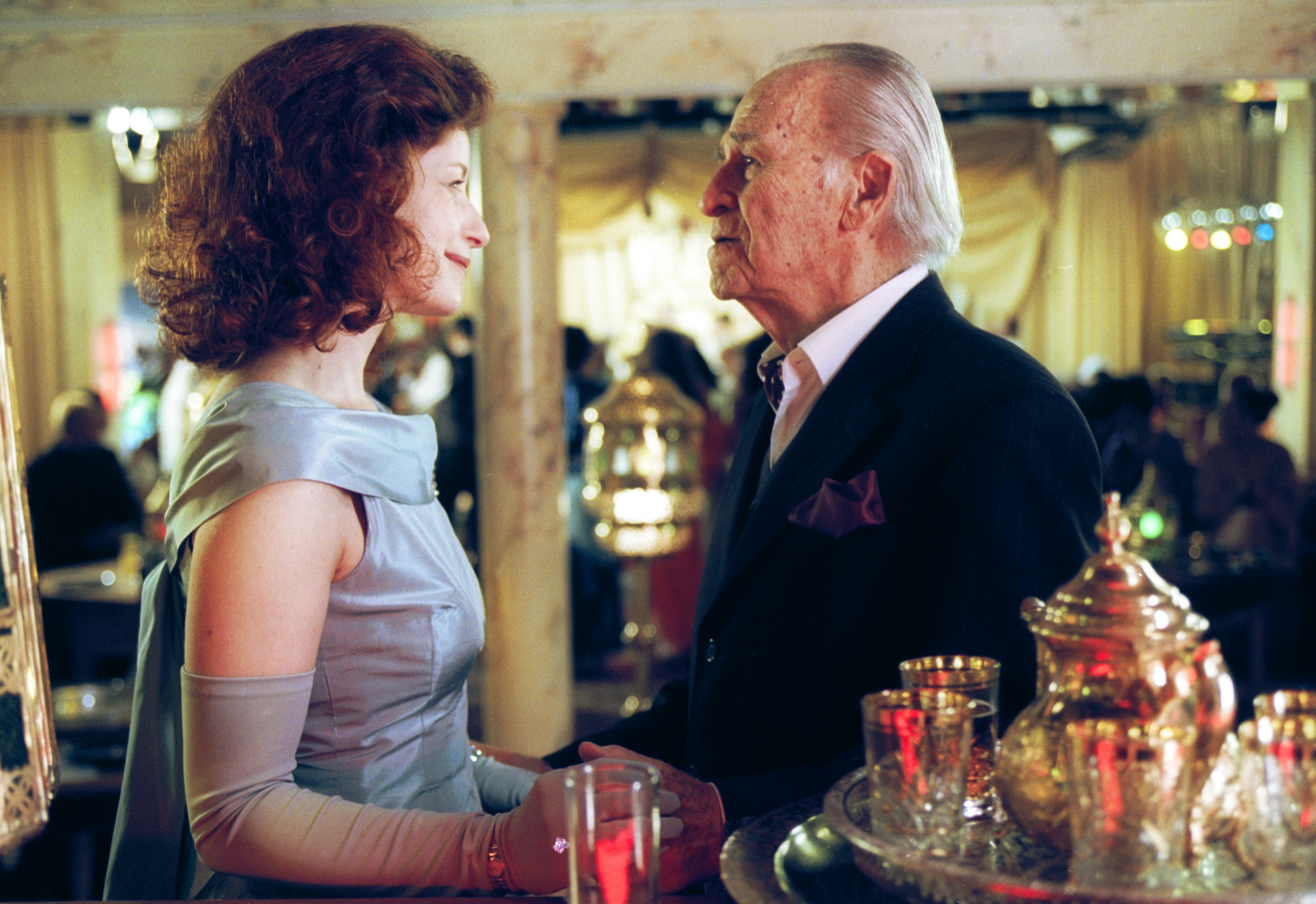 טנגו רשבסקי